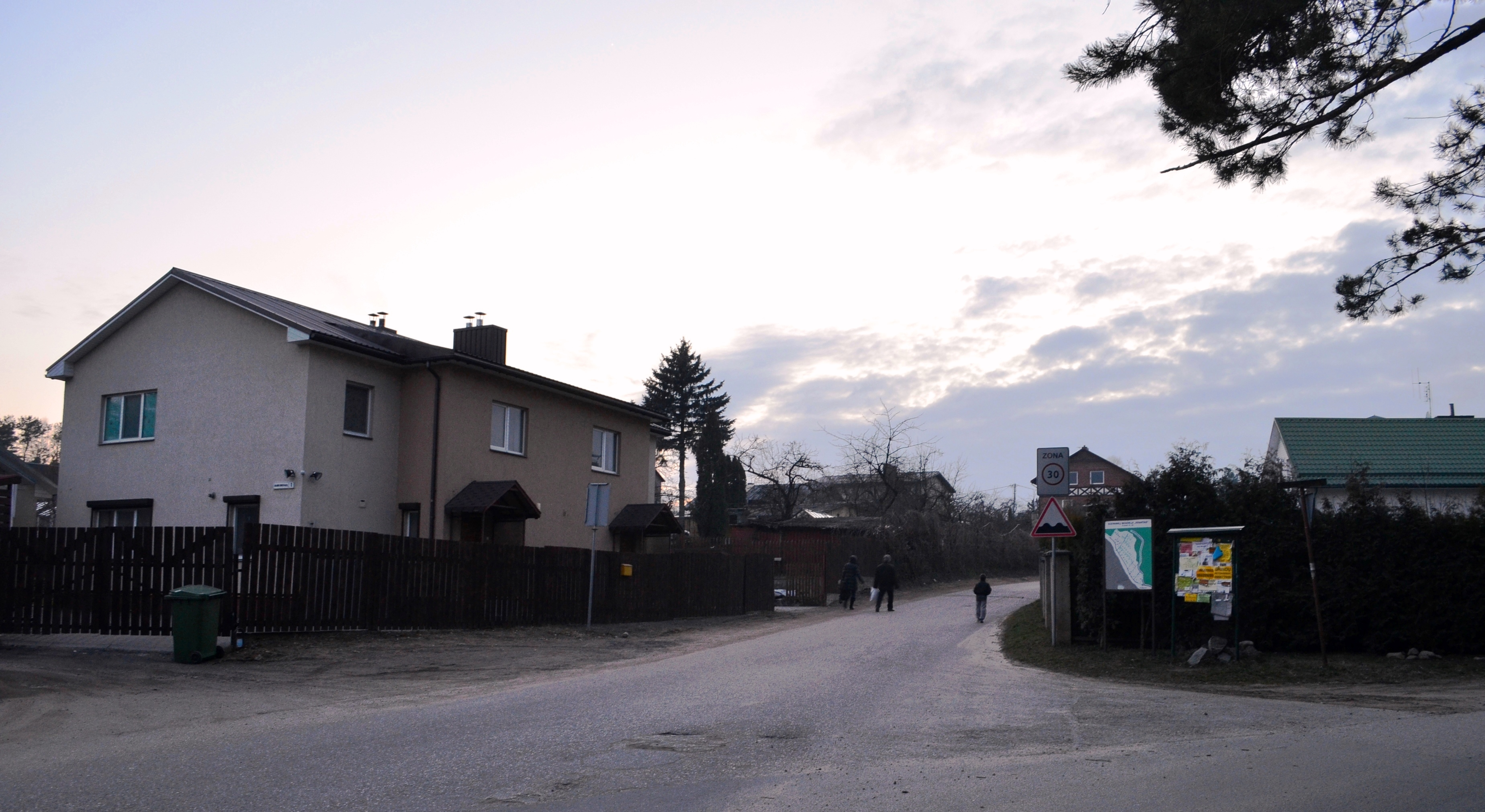 Bajorai, Vilnius